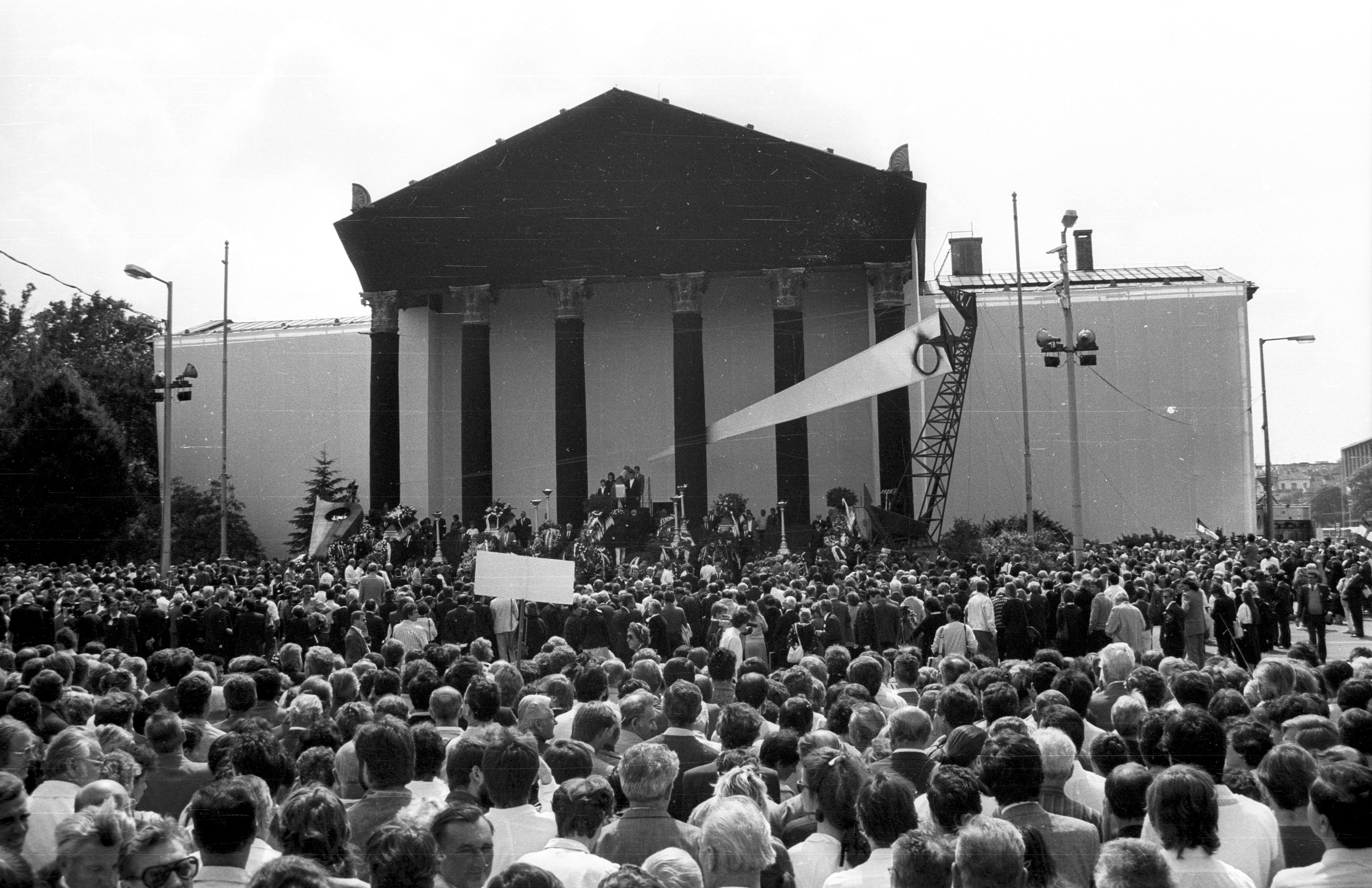 Hősök tere 1989. június 16-án, az 56-os hősök újratemetésekor. Location: Hungary, Budapest XIV. Tags: politics, political decoration, Budapest, mass Title: Hősök tere 1989. június 16-án, az 56-os hősök újratemetésekor.